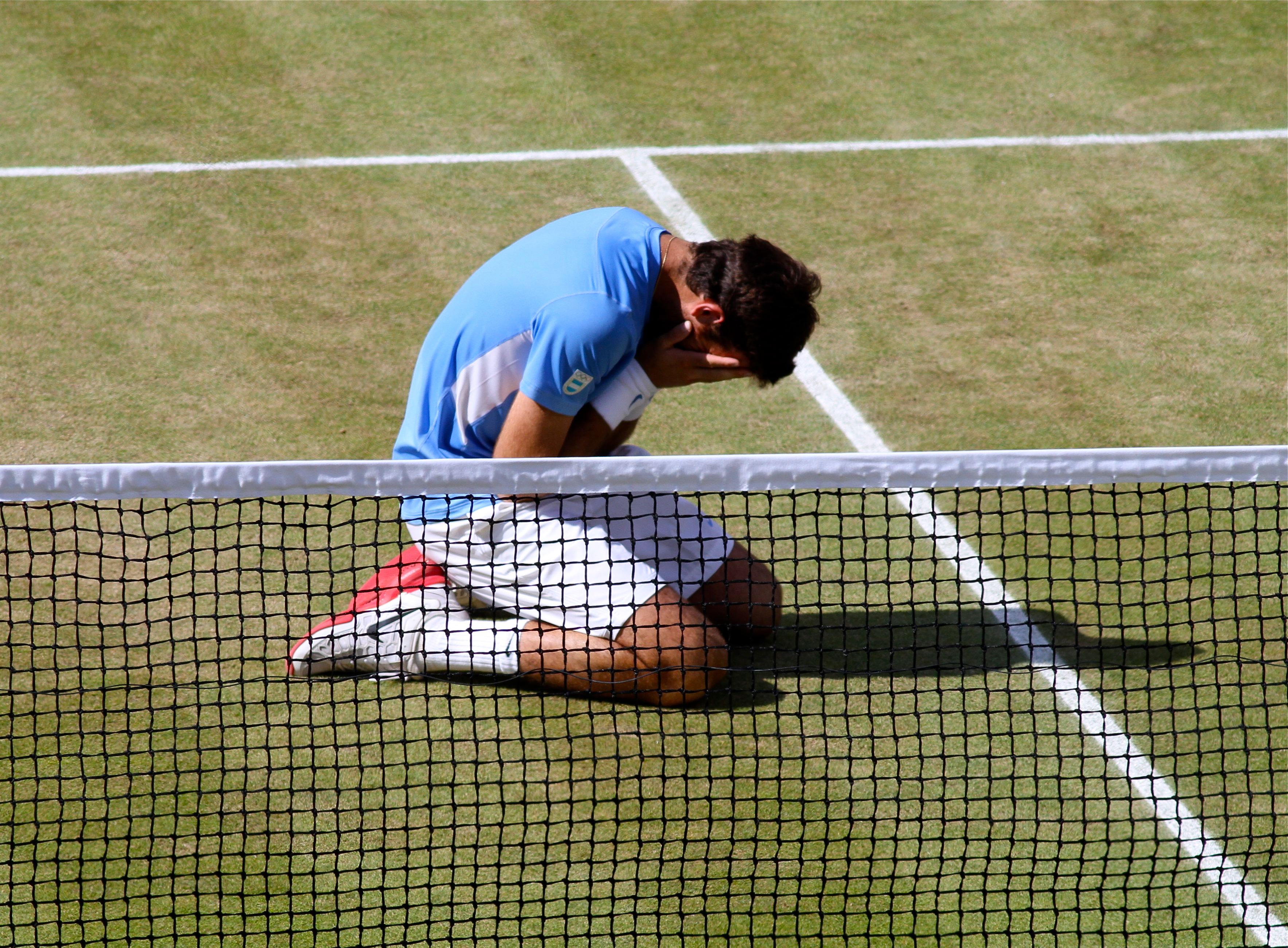 Del Potro emocionado tras ganar la medalla de bronce en los Juegos Olímpicos de Londres 2012.